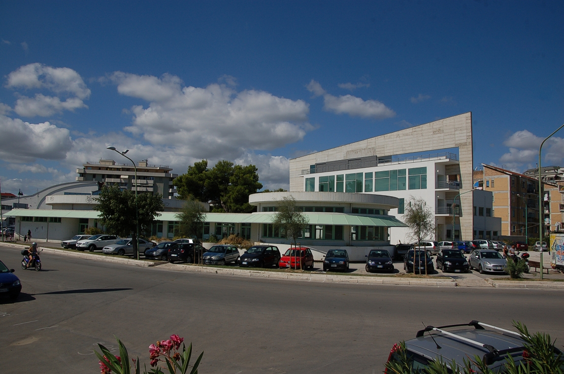 Pescara